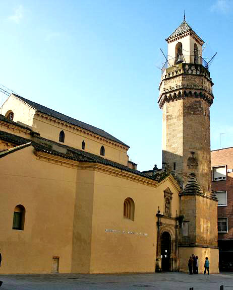 Iglesia de San Nicolás de la Villa (Córdoba)